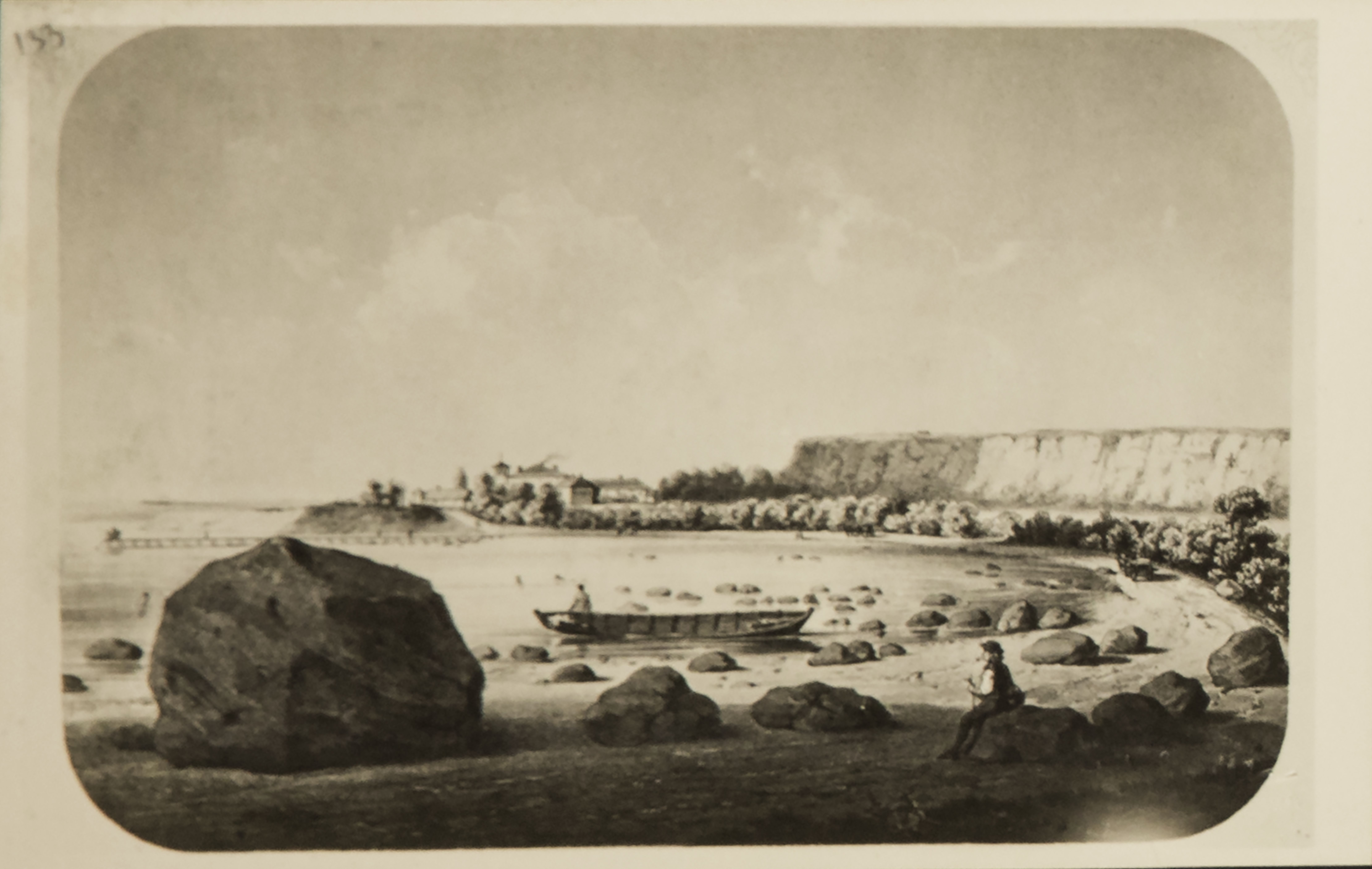 Repro graafilisest joon Lasnamägi Suhkruvabrikuga